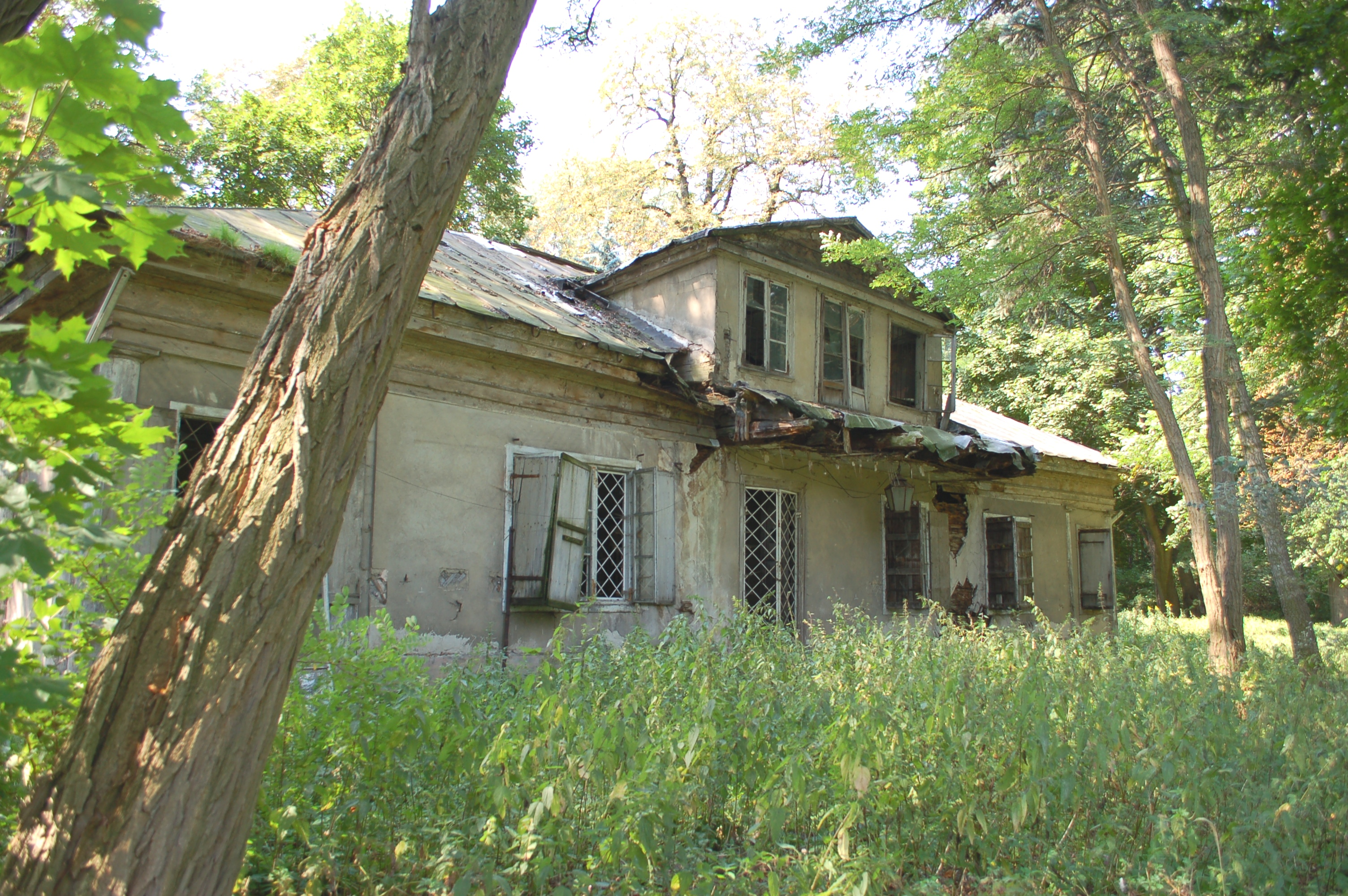 Dwór na Wyczółkach, Warszawa, Ursynów